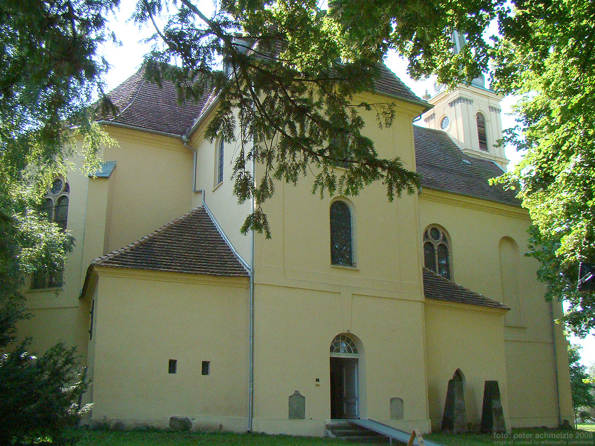 Schlosskirche Ivenack, Nordseite